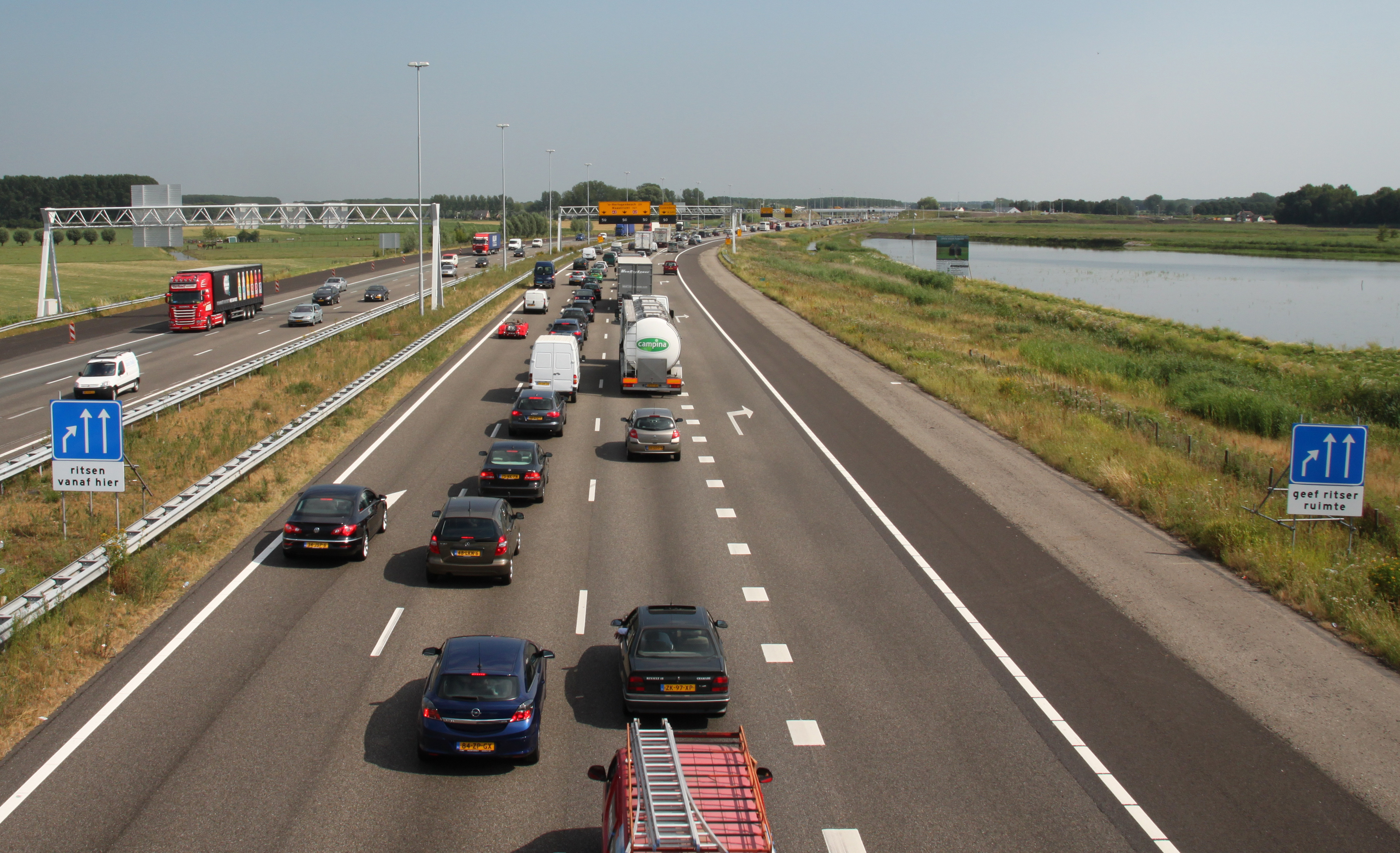 Het ritsen op de Autosnelweg A2. Ritsen zorgt vaak voor congesties.